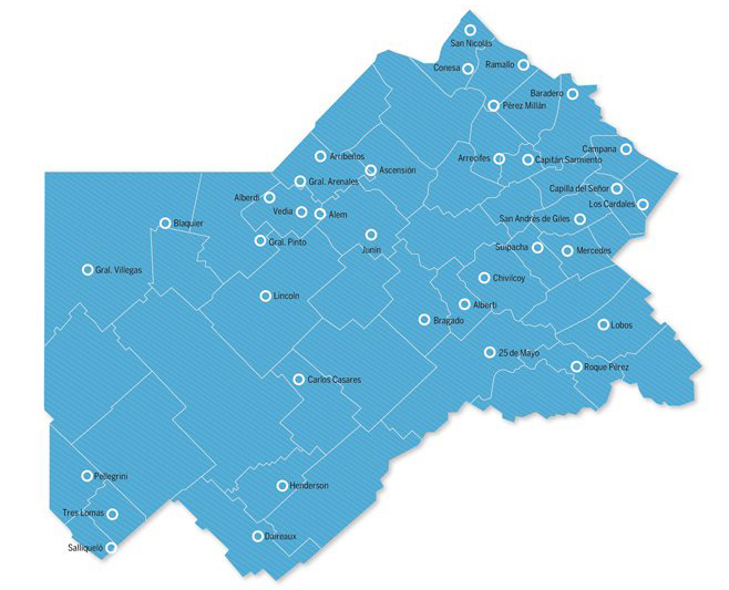 EDEN (Empresa Distribuidora de Energía Norte S.A.) trabaja en un área de 36 sucursales agrupadas en 8 áreas geográficas de trabajo, con cabeceras en las ciudades de San Nicolás, Arrecifes, Campana, Junín, Chivilcoy, Mercedes, Lincoln y Carlos Casares.